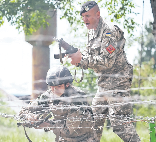 Морські піхотинці долають спеціальну смугу перешкод під час іспиту на право гордо носити чорний берет Фото: Андрій Скаржинець